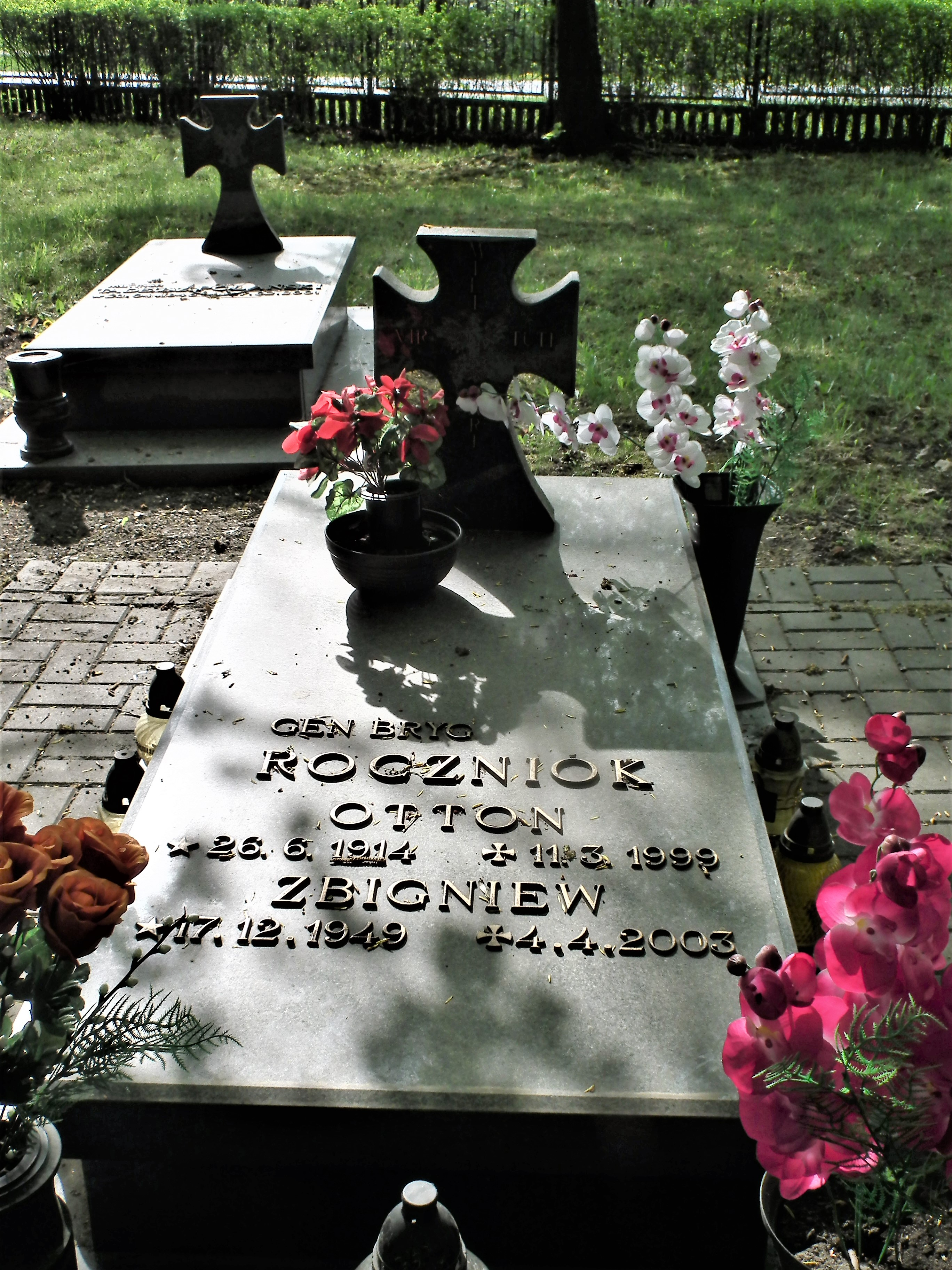 Cmentarz Garnizonowy w Katowicach.